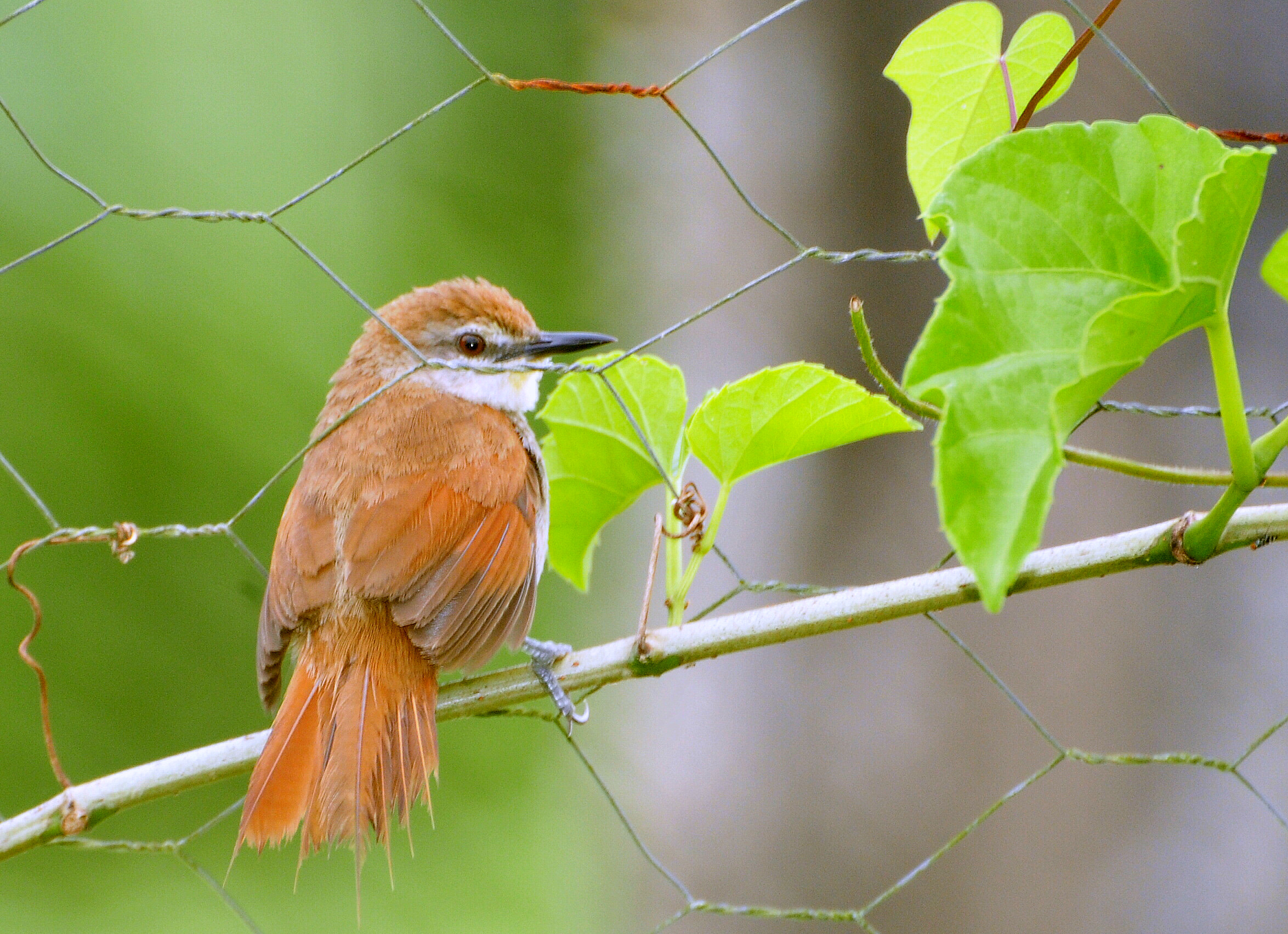 Lanchonete OASYS - Vale do Ribeira - Registro-SP - Brasil